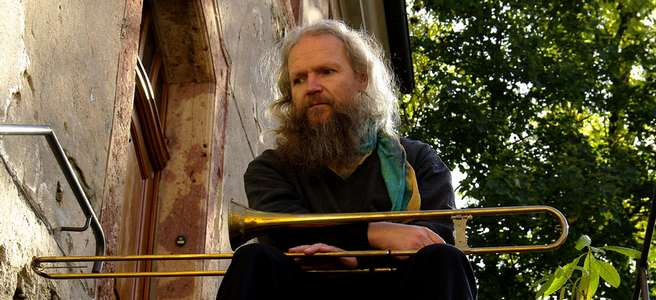 "Freiheit, Mathematik und Posaune" Der Jazzmusiker Günter Heinz aus Kleinwaltersdorf arbeitet z. Zt. an der spanischen Fassung seiner Kammeroper "Wttgenstein" Foto am 13.10.2008 in Kleinwaltersorf von Hans-Joachim Maquet mit PENTAX K20D